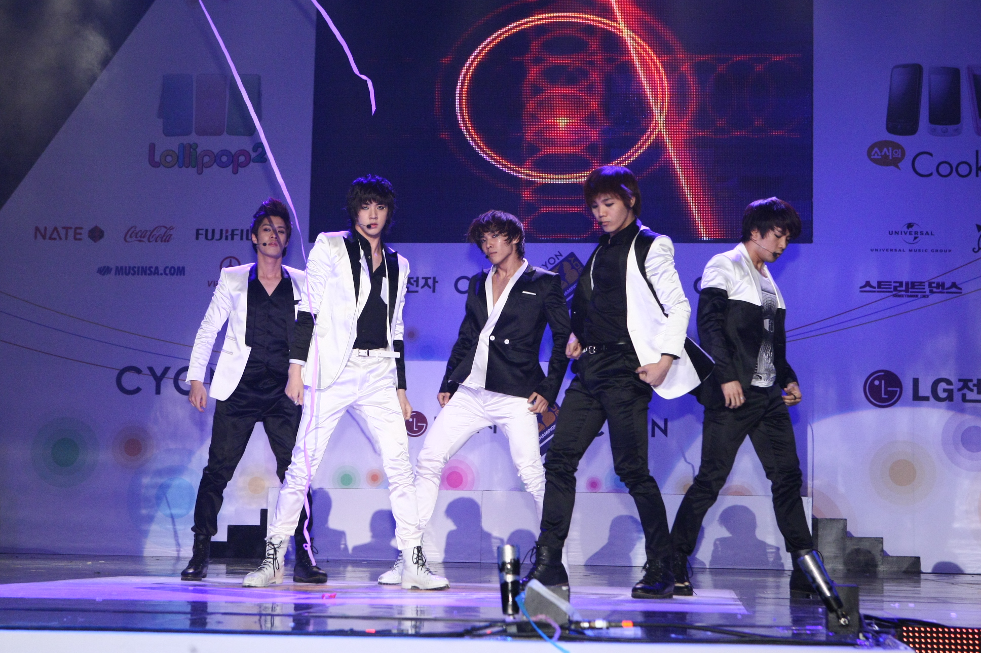 LG전자, ‘CYON 비보이 챔피언십 2010’ 본선 개최 LG전자가 29일 저녁 잠실 올림픽공원에서 ‘제 4회 CYON 비보이 챔피언십 2010’ 본선대회를 열었다. ‘07년에 시작된 이 행사는 올해로 4회째를 맞는 명실상부 국내 최대 비보이 축제로 자리잡았다. 이날 행사에서는 3,000여 명의 관람객들이 참석한 가운데, 비보이들의 화려한 댄스 배틀과, 은지원, 에픽하이, 타이거JK, 윤미래, 앰블랙, 슈프림팀 등 국내 인기 가수들이 참여한 ‘롤리팝 콘서트’가 함께 진행됐다.